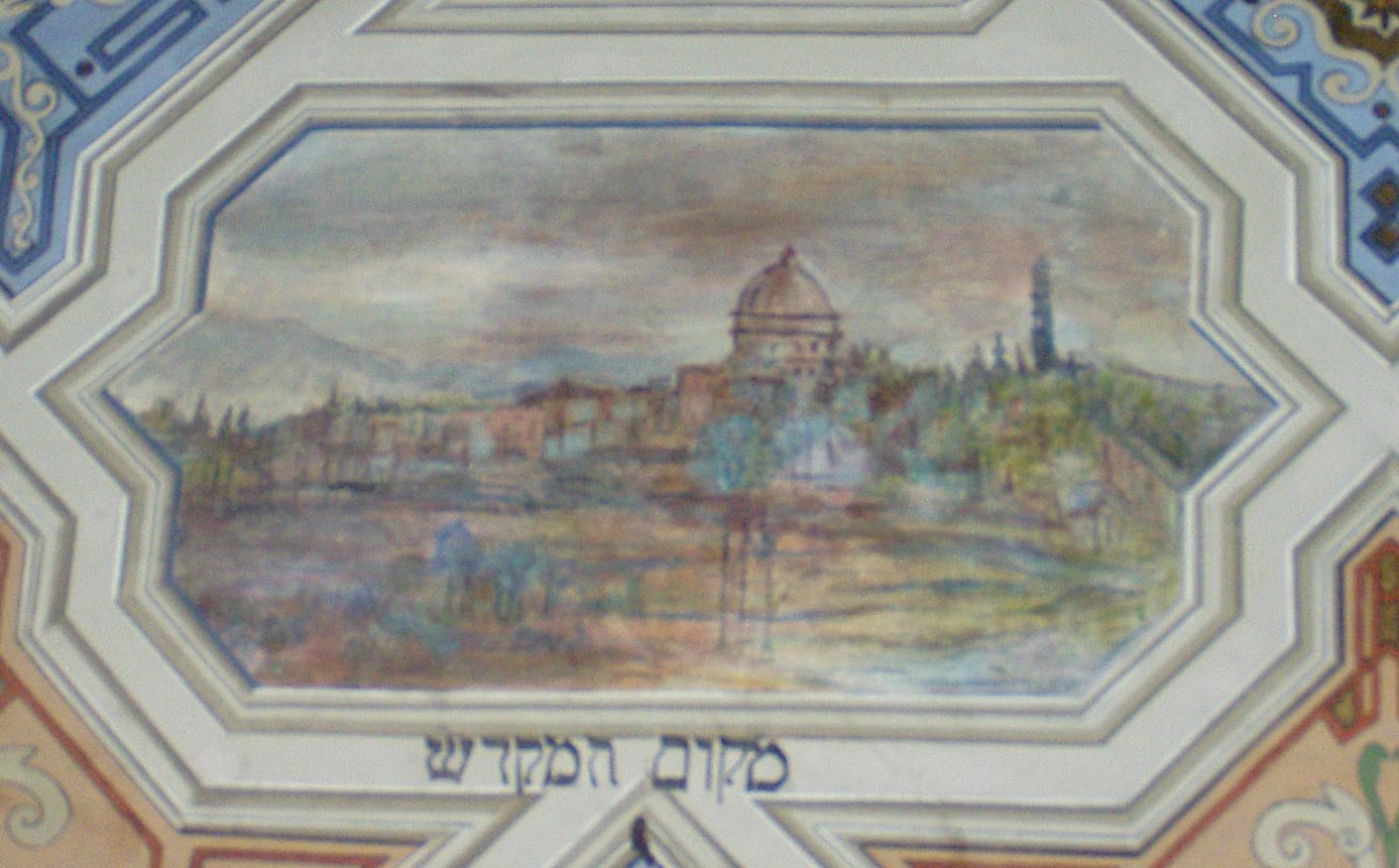 Sceny biblijne na stropie synagogi Kupa w Krakowie